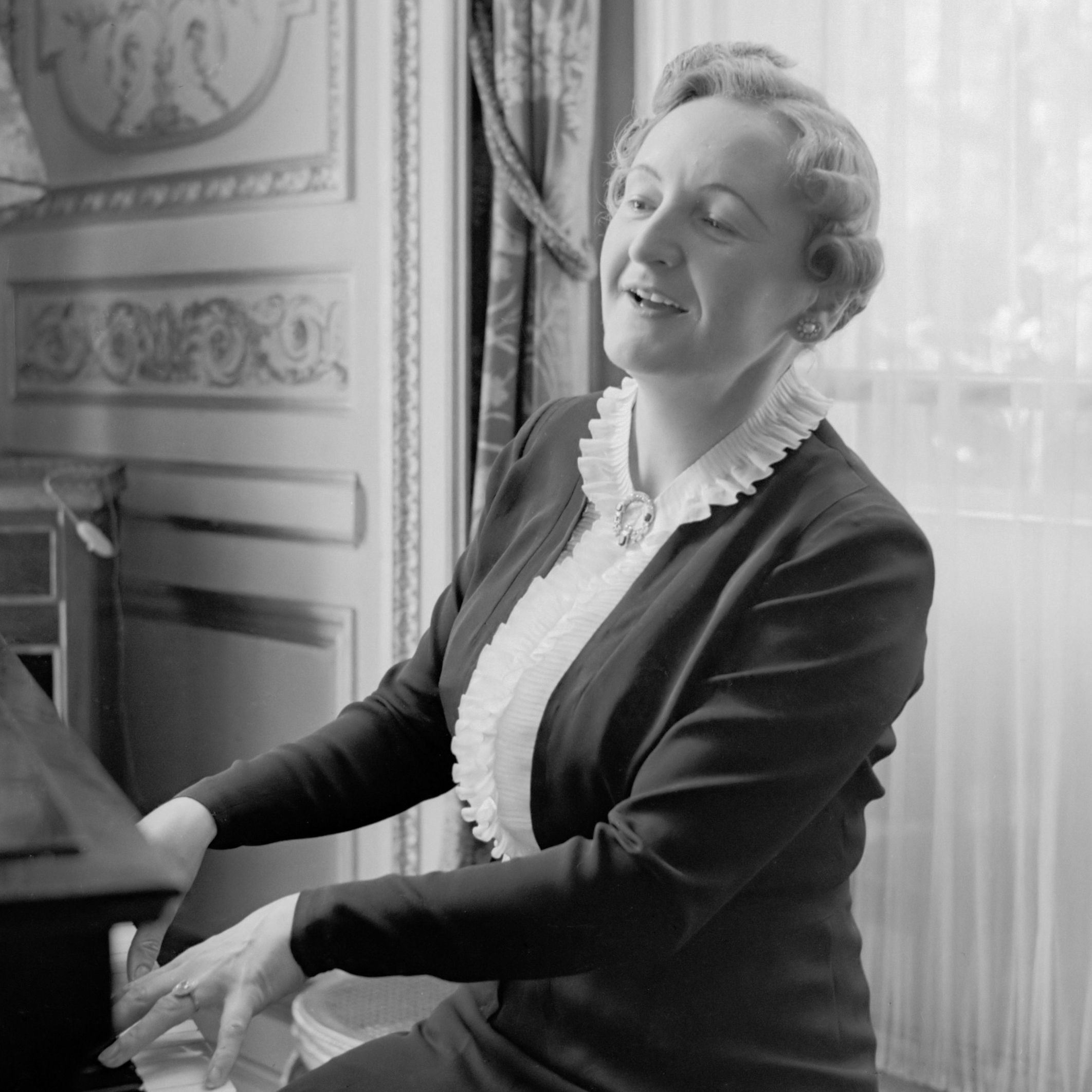 Pavla Vachková-Osuská, echtgenote van diplomaat Štefan Osuský, zingt en speelt piano 1939